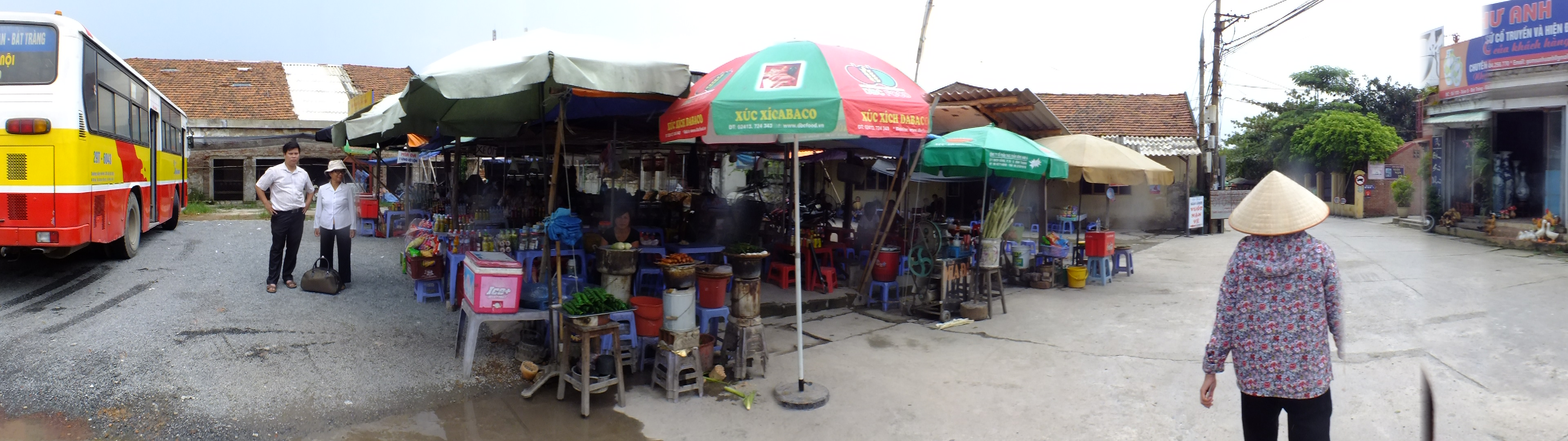 Xã Bát Tràng、 鉢塲社 バチャン村